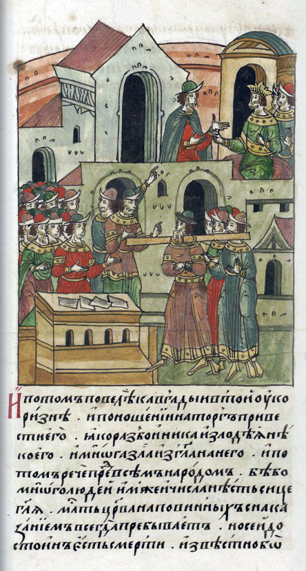 ЛИЦЕВОЙ ЛЕТОПИСНЫЙ СВОД и потом повелел Кавгадый в таковой укоризне и поношении на торг привести его, словно разбойника и злодея некоего, и много зла изглаголал на него. И потом сказал перед всем народом, ибо было там много людей, так что числа им не было, говоря: «Милость царева на повинных с наказанием всегда пребывает, но сей достоин смерти, ибо известно